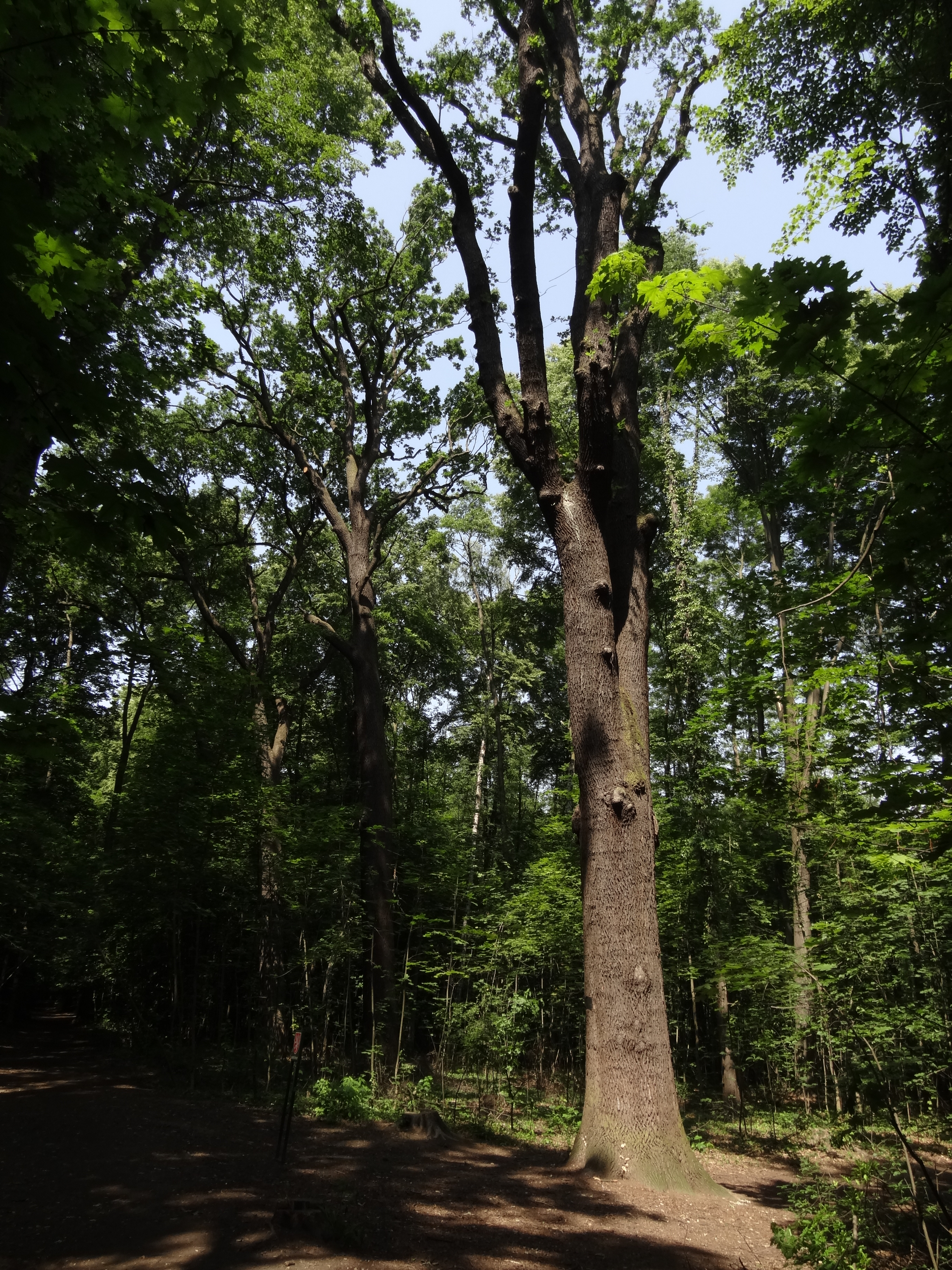 Vinoř - Miranovy duby